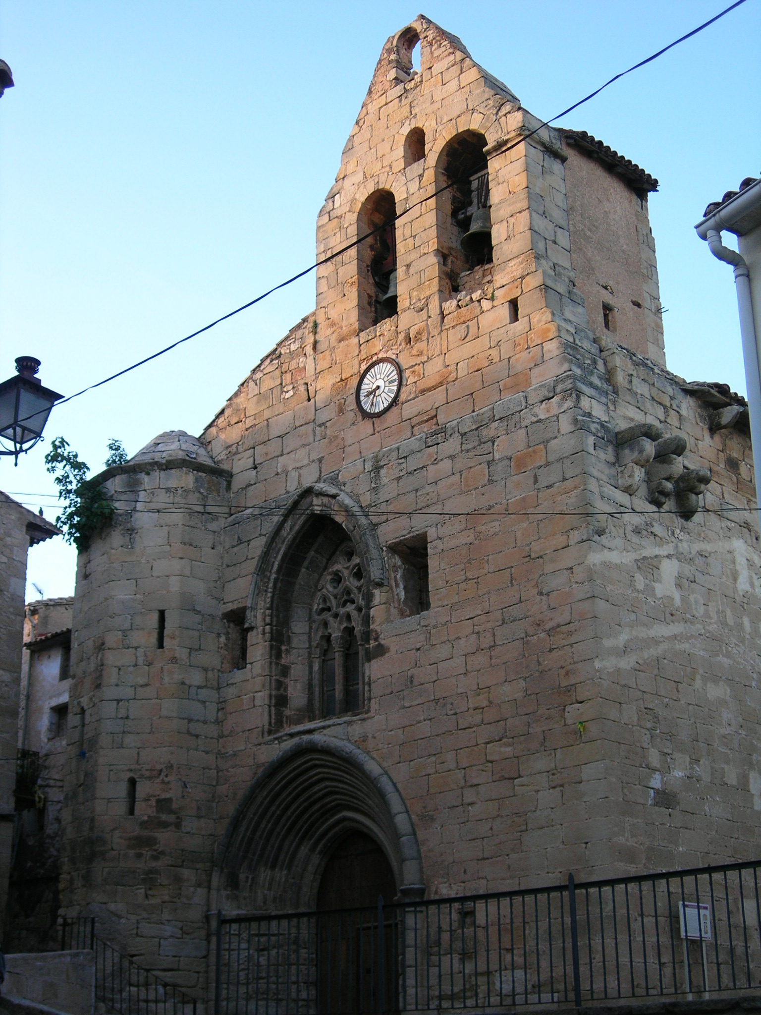 Església de Santiago Apòstol (Lledó d'Algars)